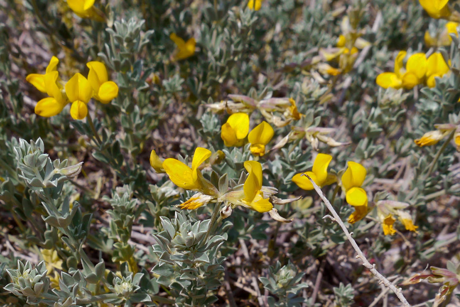 Cuernecillo de Mar, Lotus creticus, en las salinas de Marchamalo, Cartagena, España.